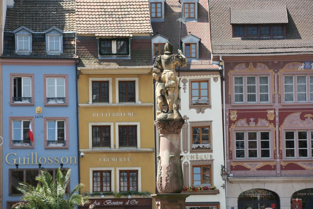 Facades Place de la Réunion Mulhouse Photo libre de droit Site mairie de mulouse